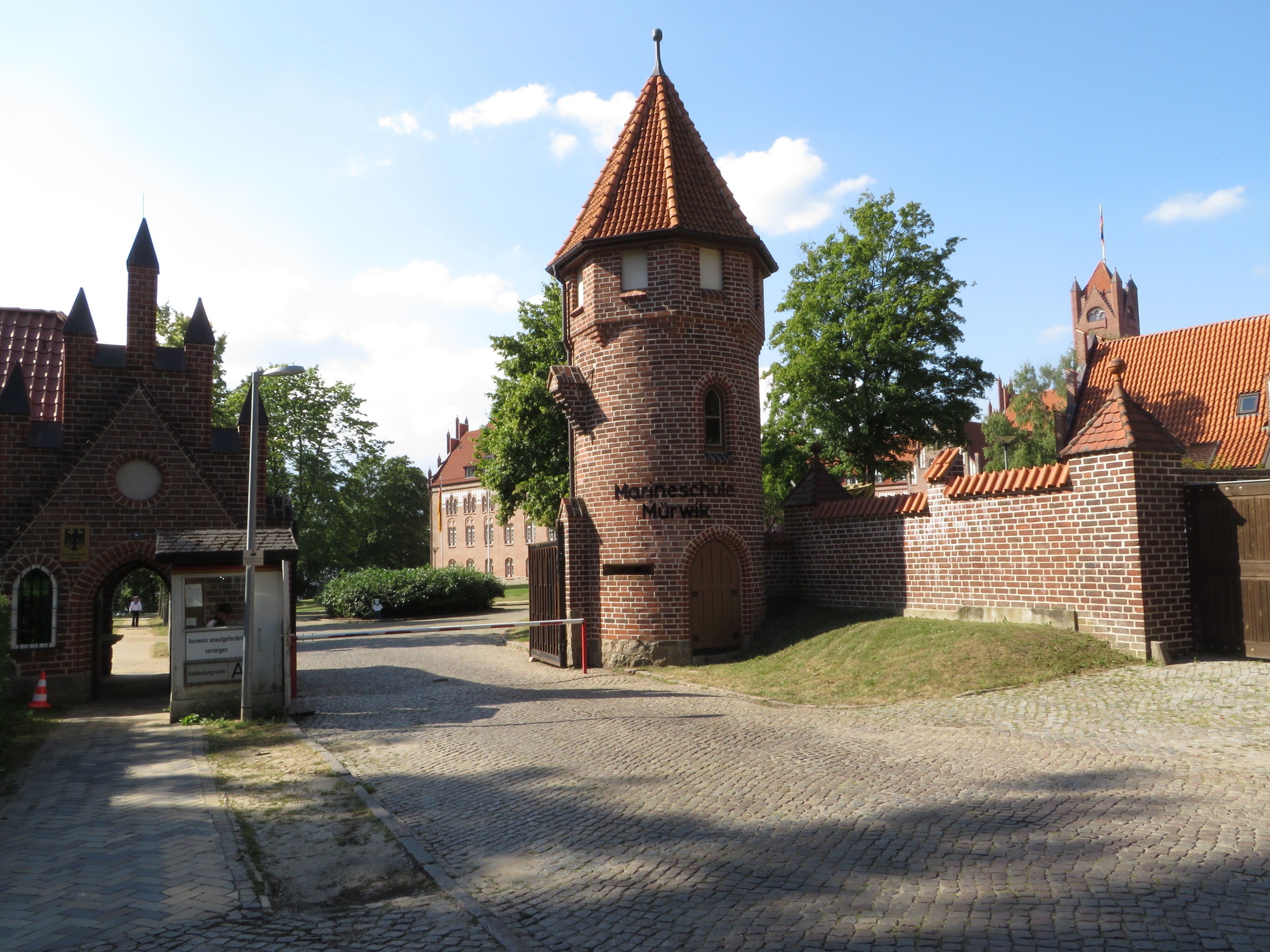 Torwache der Marine-Burg in Muerwik (2014), Bild 02